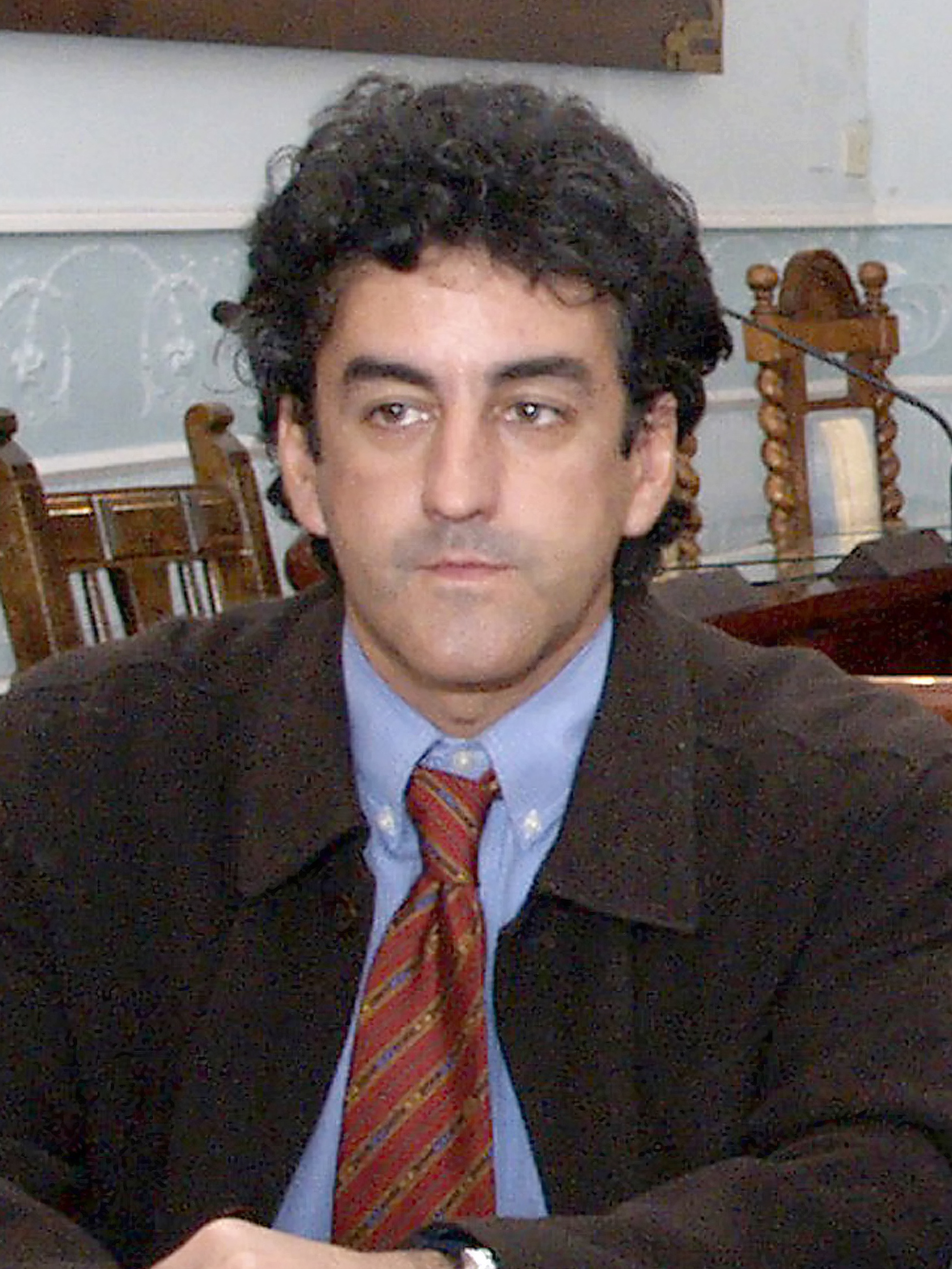 La CHN nombra a Francisco Martín como su representante ante el Consejo Nacional del Agua